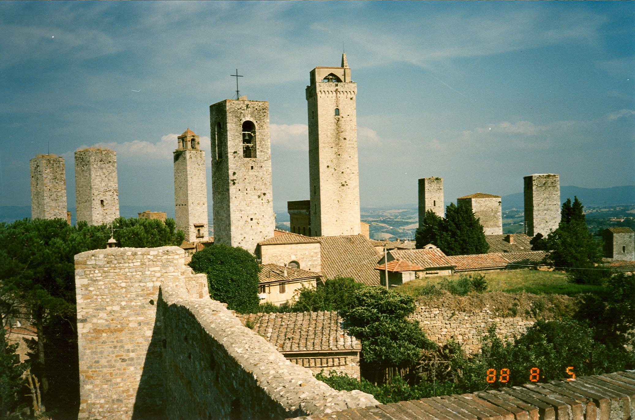 Italy_San_Gimigniano,_I_1988.jpg